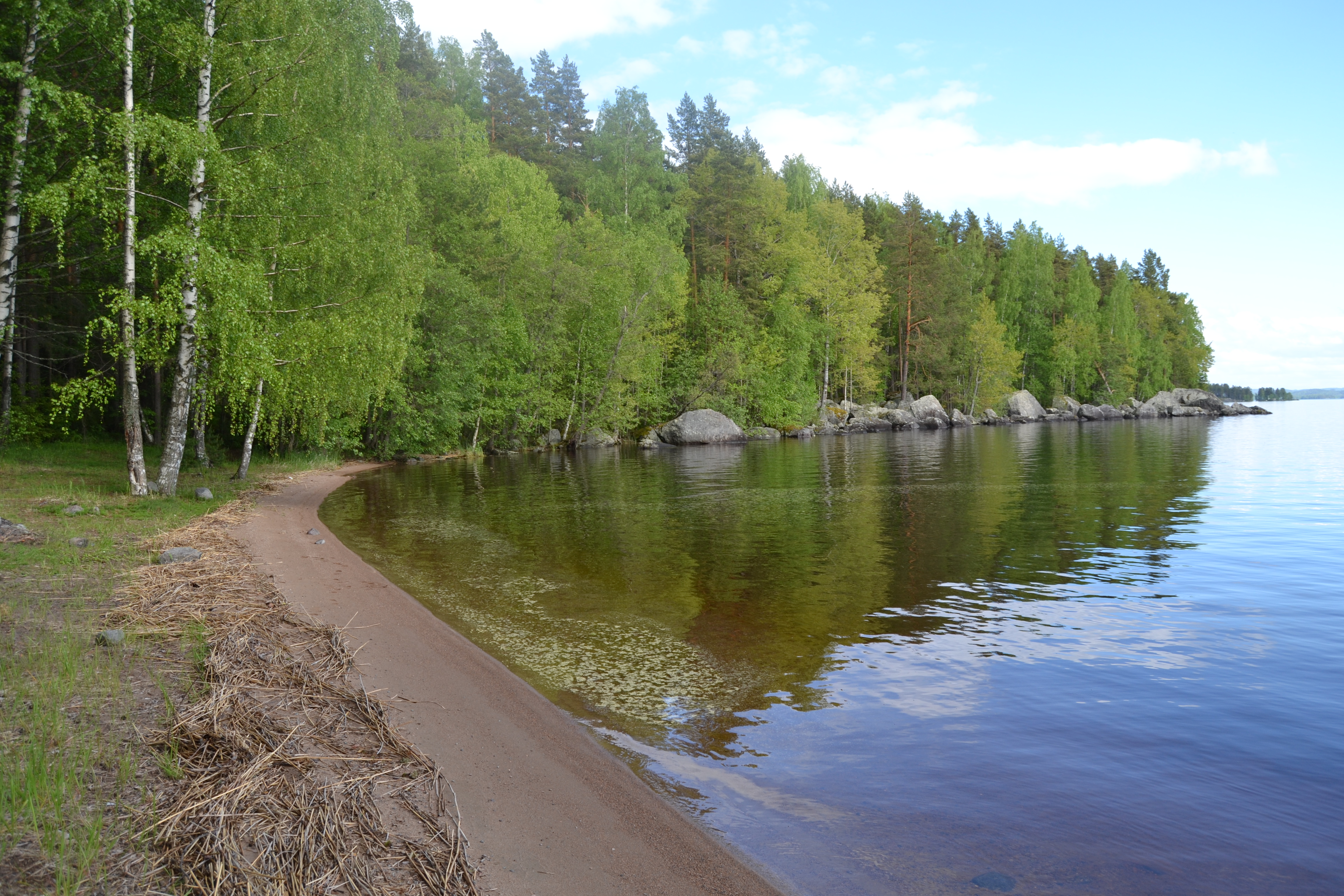 Pahkalahti